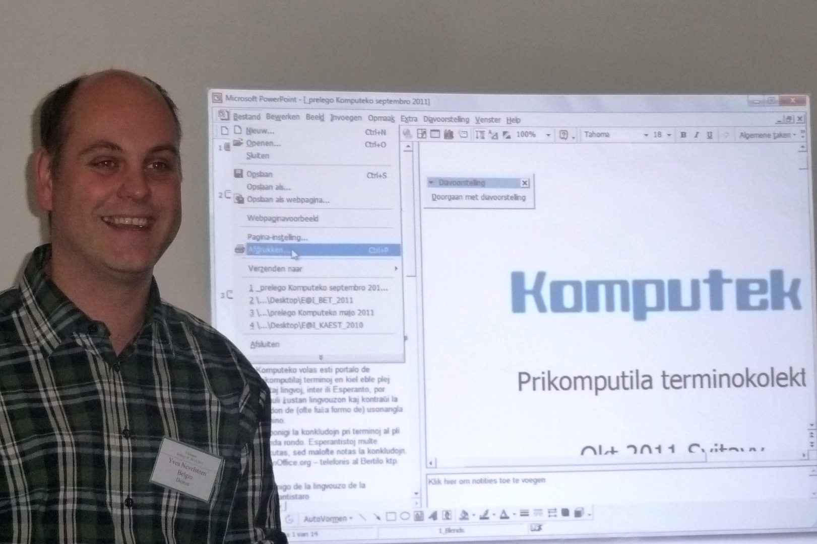 Yves Neveslteen (Belgio) prelegas pri plurlingva komputiltermina kolekto Komputeko dum Esperanta Vikimanio en Svitavy, Ĉeĥio (la 27-an de oktobro 2011)